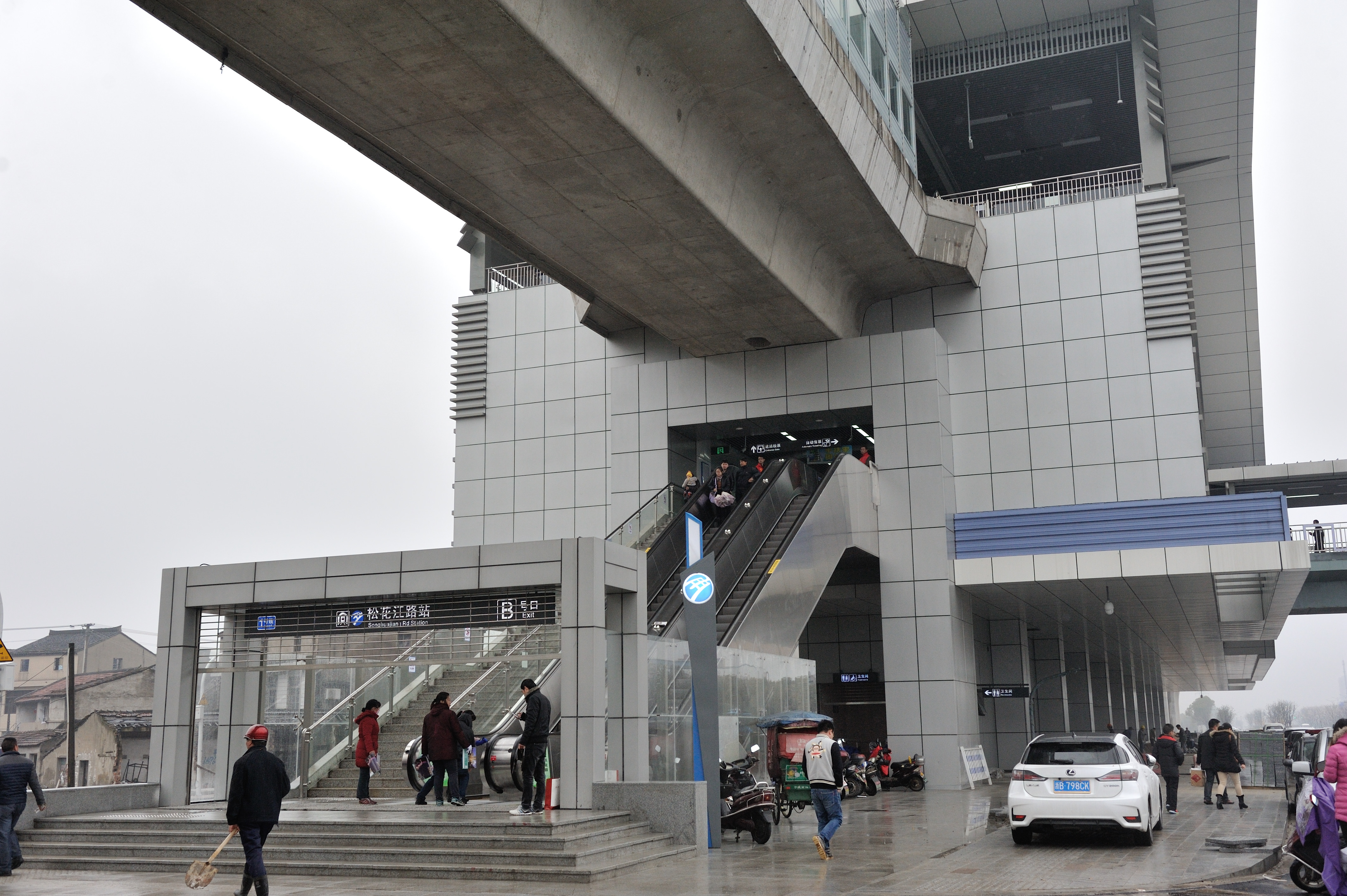 宁波地铁松花江路站